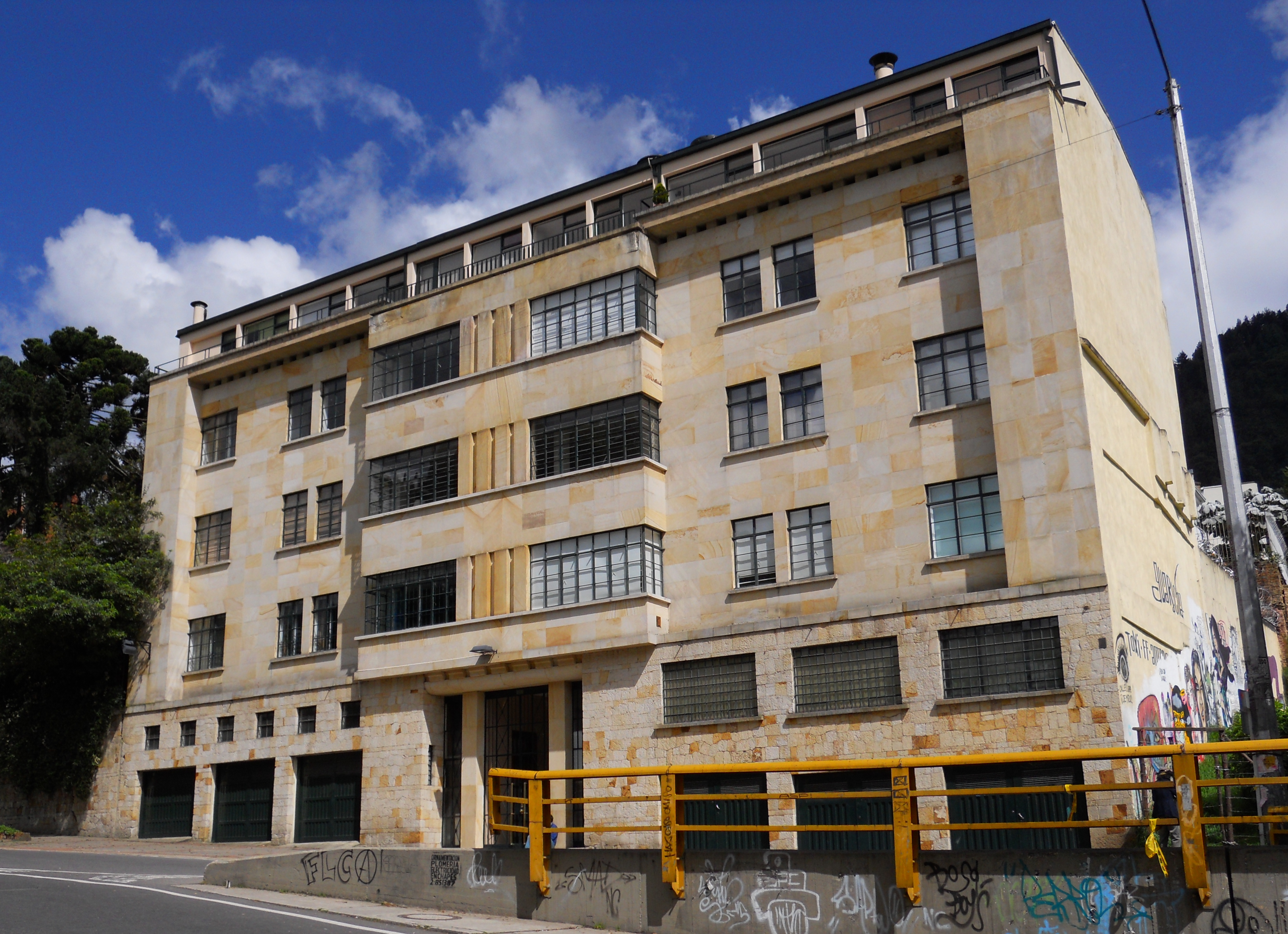 Edificio de Herrera de la Torre, de Vicente Nasi en la carrera Quinta con calle Veinticinco, barrio Bosque Izquierdo.